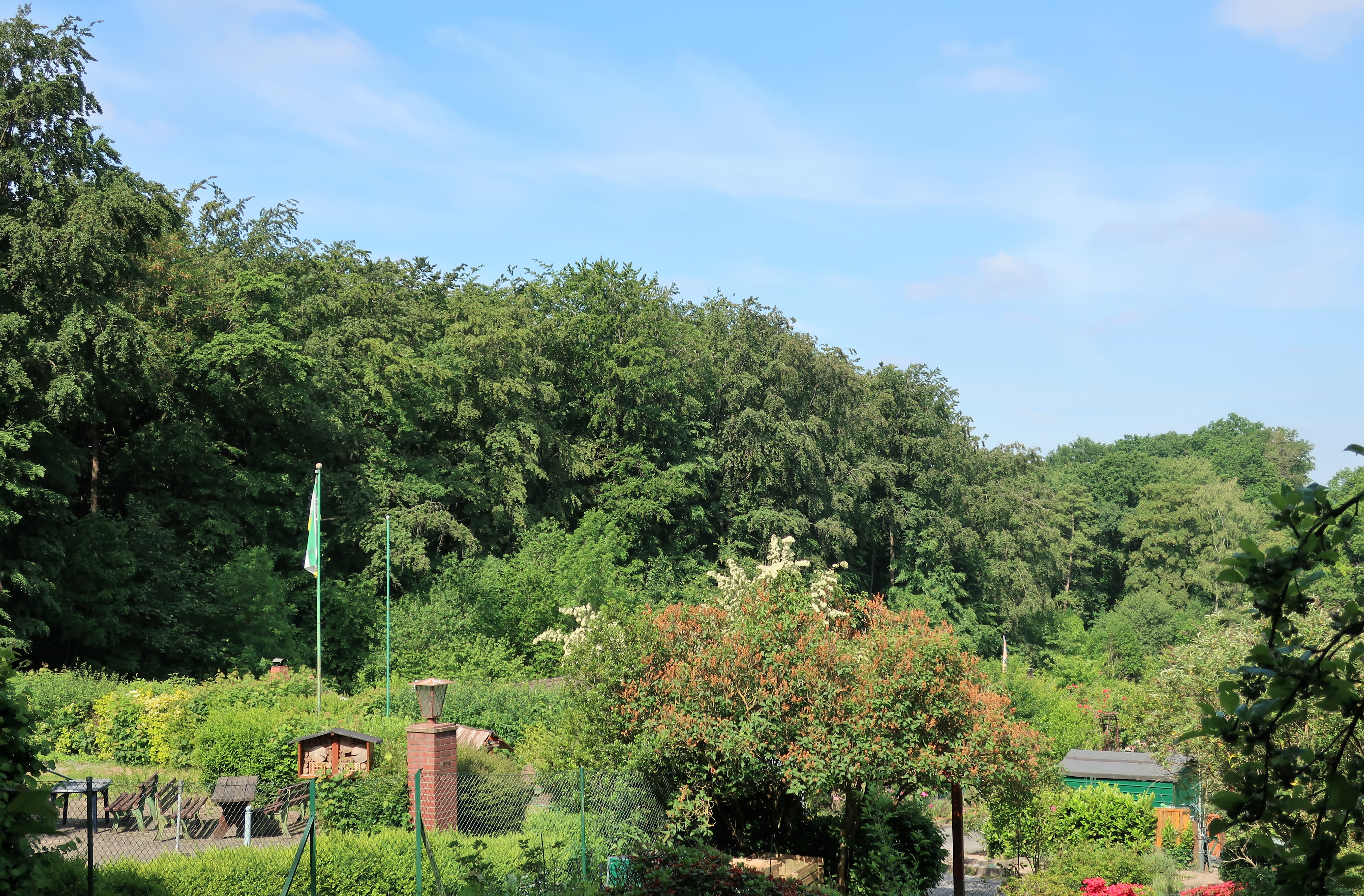 Geschützer Landschaftsbestandteil 1.4.2.22 „Ischelandbach“ in Hagen. Der Bereich liegt in der Dauerkleingartenanlage Ischeland. Es handelt sich um einen Bachsiepen mit Zuläufen und um waldähnliche Gehölzbestände.